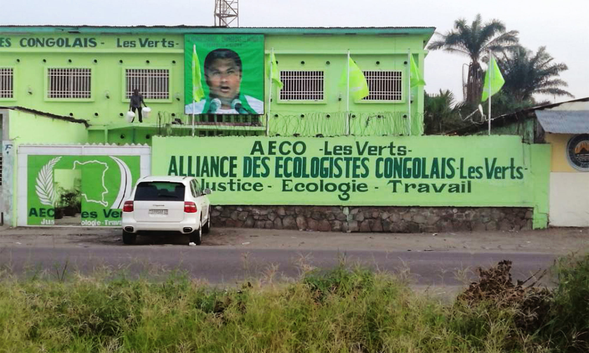 Kinshasa